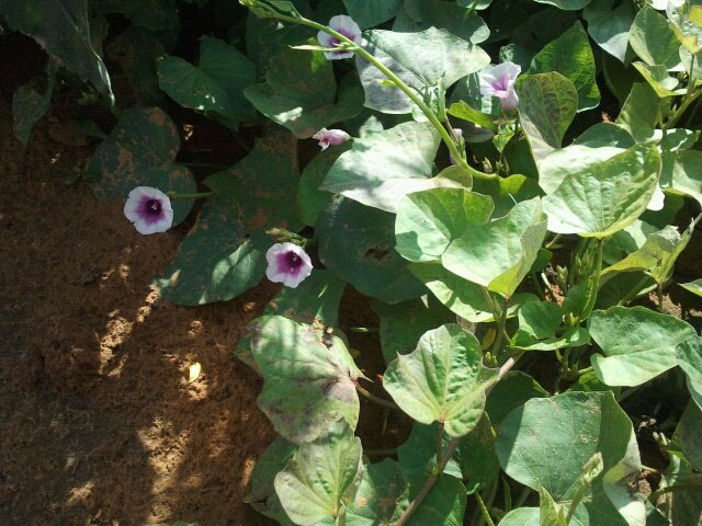 פרחי בטטה